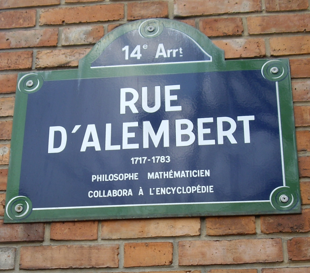 Plaque de la rue d'Alembert, Paris 14e, en mémoire de l'encyclopédiste Jean le Rond D'Alembert (1717-1783).